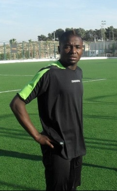 Kapolongo at Shabab al Ordon training